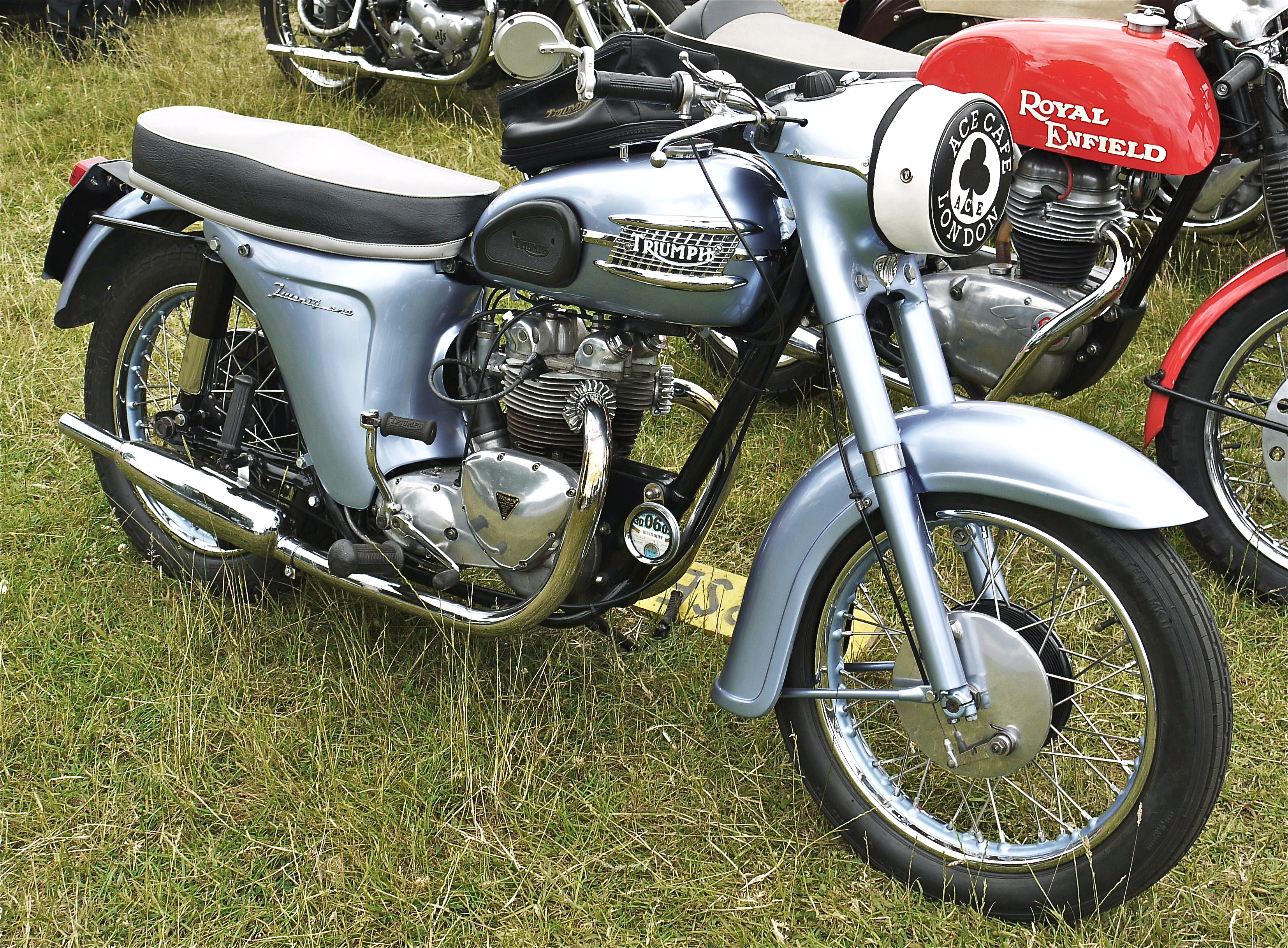 Panasonic G1